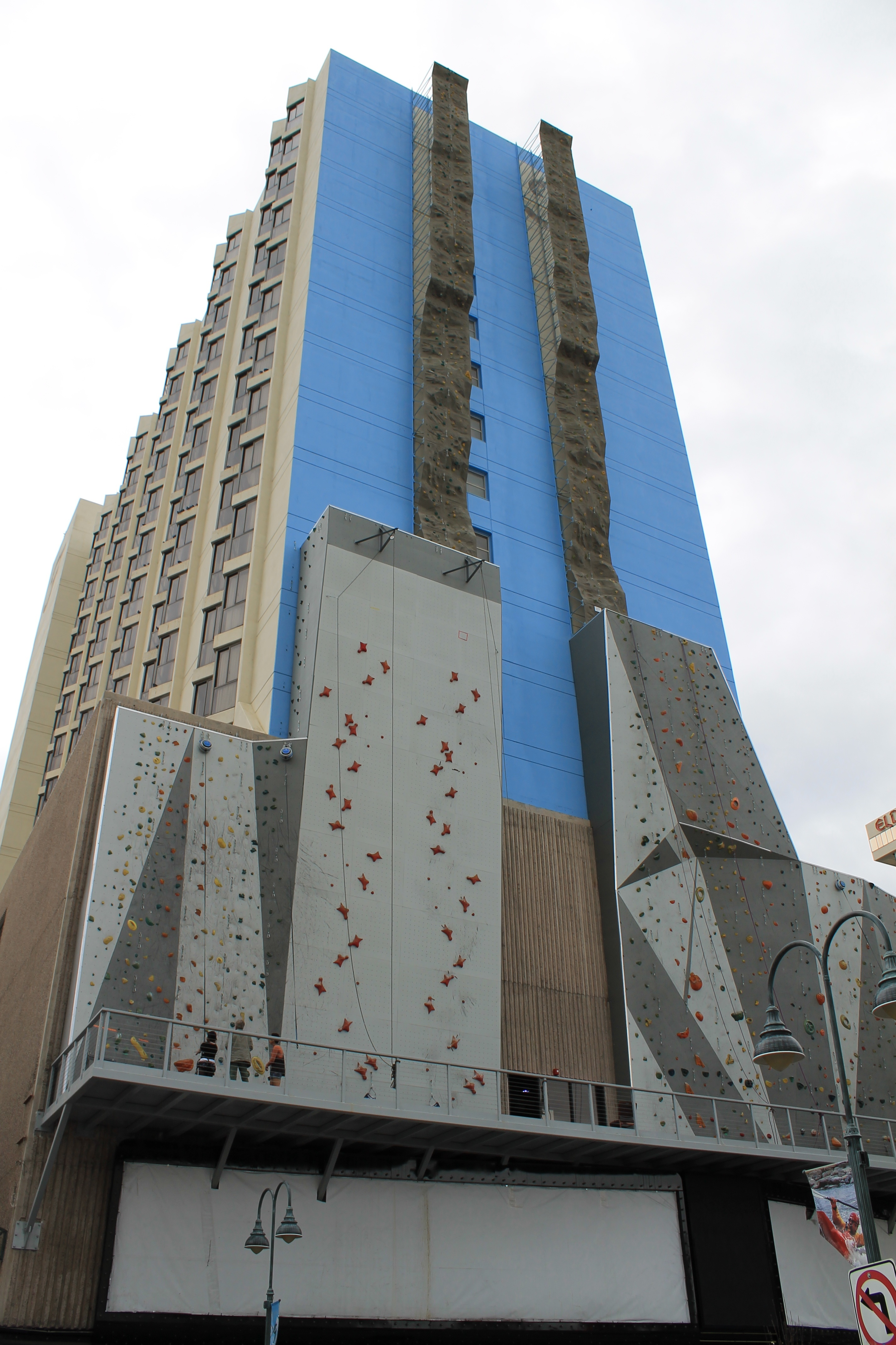 Reno, Nevada